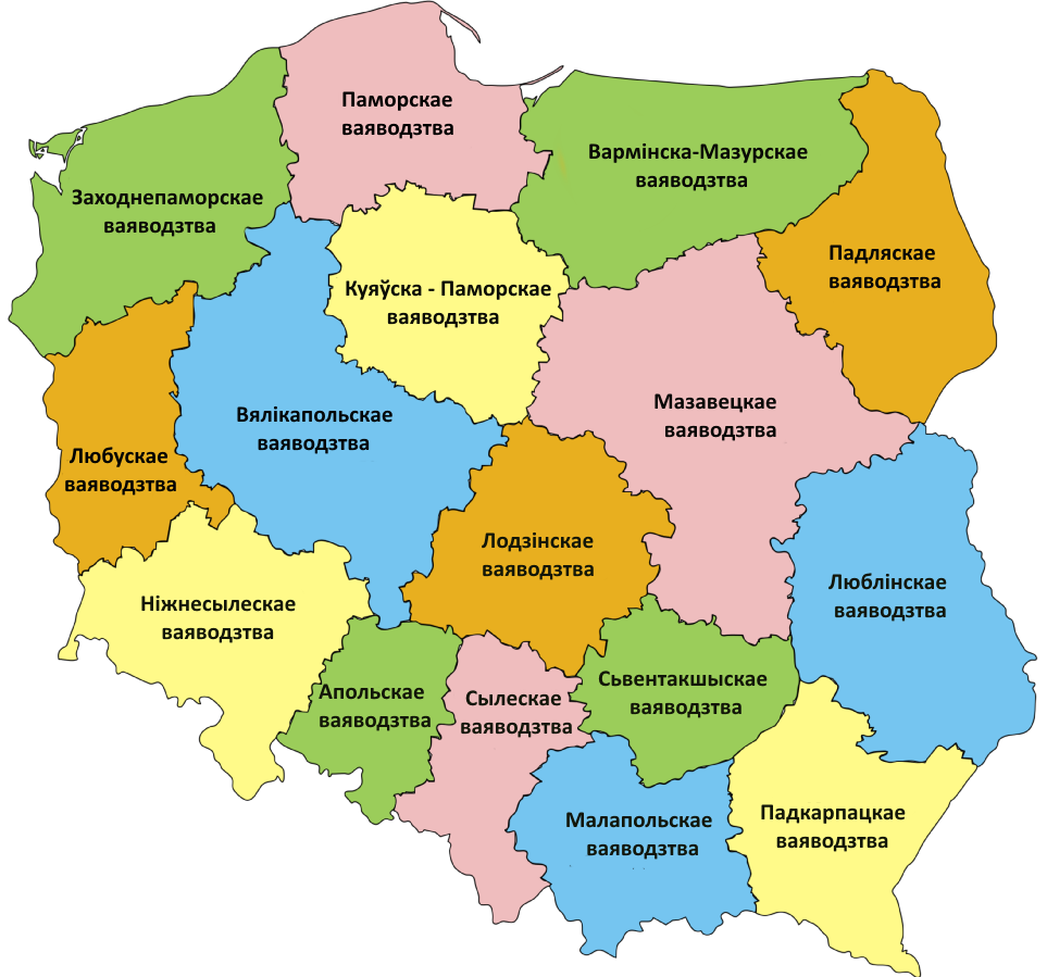 Беларуская (тарашкевіца): Мапа ваяводзтваў Польшчы